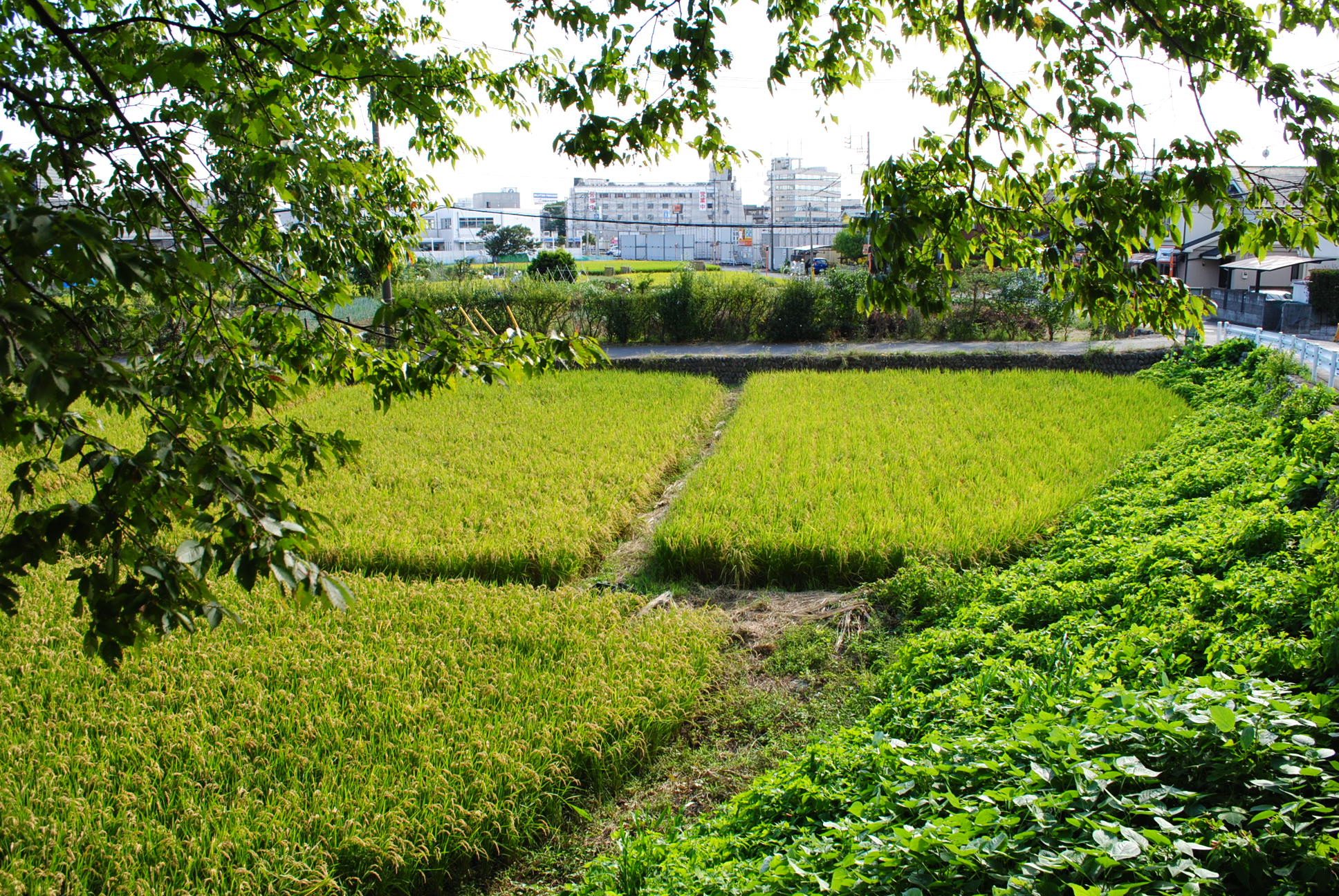 国立市谷保